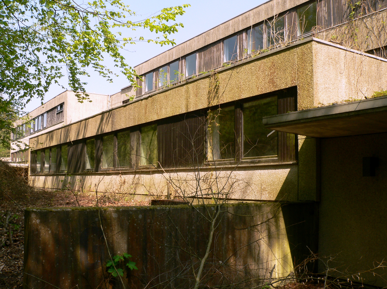 PATVN Wennigser Mark